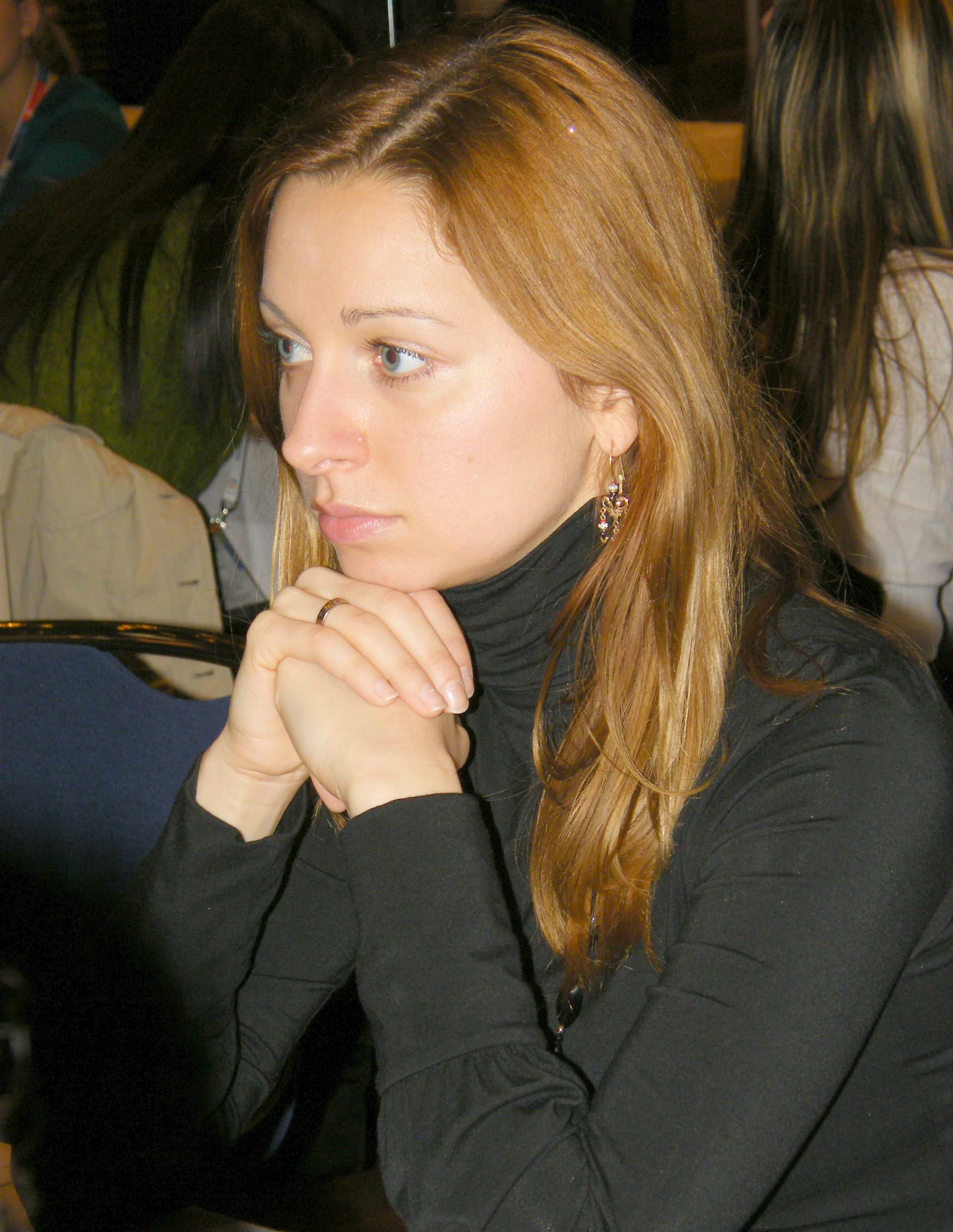 Regina Pokorna bei der 38. Schacholympiade in Dresden 2008